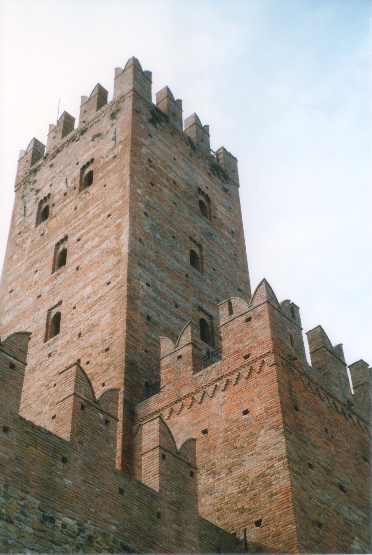 Autore Giorces.